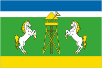 Флаг Каладжинского сельского поселения, Краснодарский край, Россия.